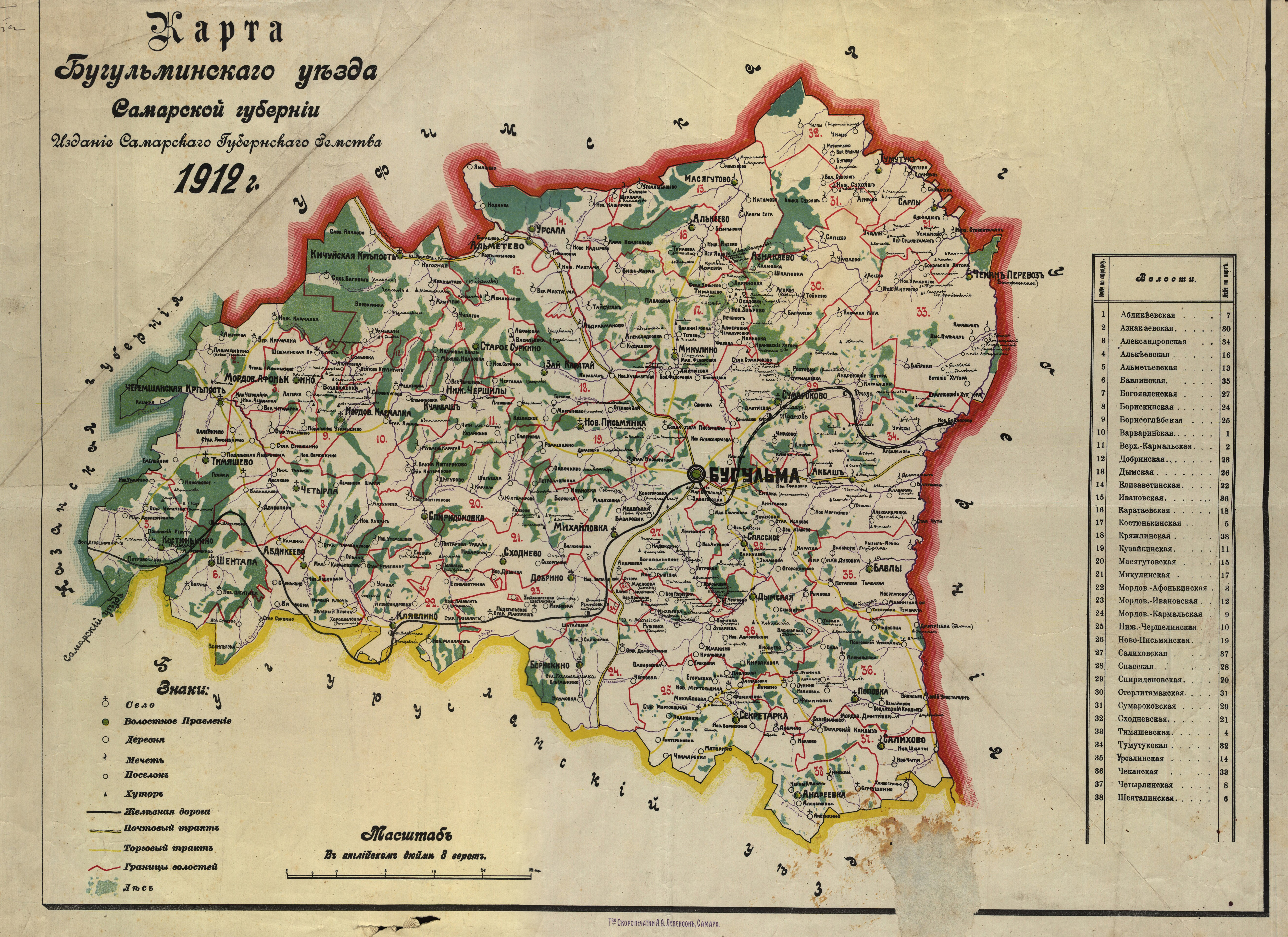 Карта Бугульминского уезда на 1912 год. Издание Самарского губернского земства.